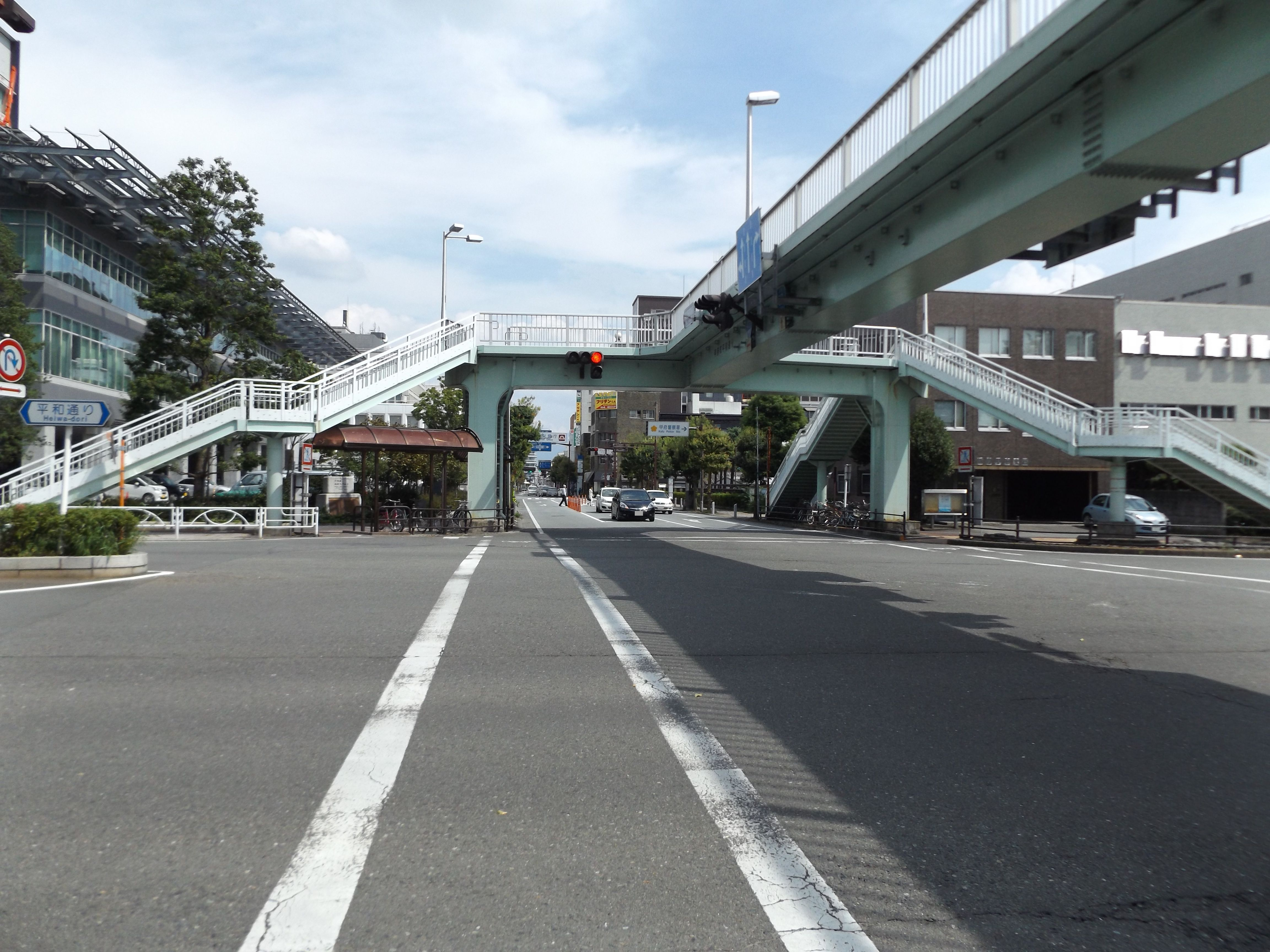 山梨県甲府市中央一丁目にある甲府警察署前交差点。（西側から撮影） 国道52号（画像右側：南方向）の終点、国道411号（画像奥側：東方向）の終点、山梨県道6号甲府韮崎線（画像左側：北方向）の起点である。 画像手前側（西方向）は甲府市道（通称：ボランティア通り）。